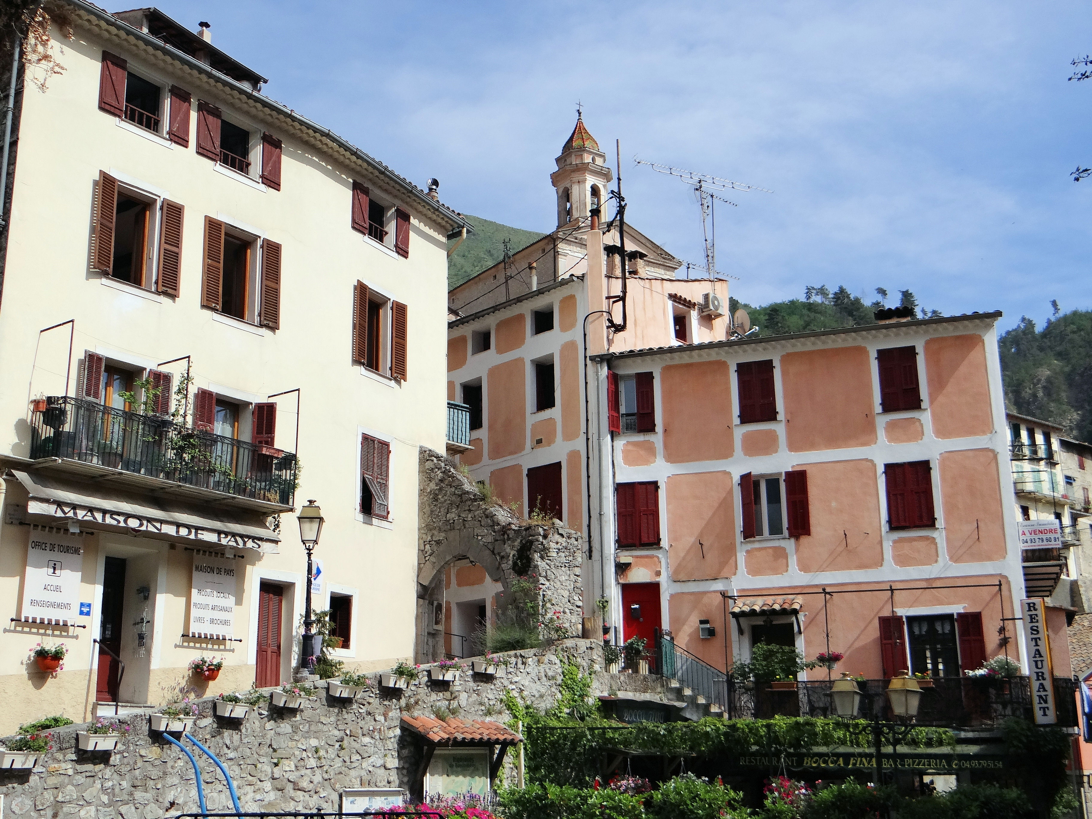 Lucéram - Place Adrien Barralis - Rue Henri Rostagni et porte Ouest